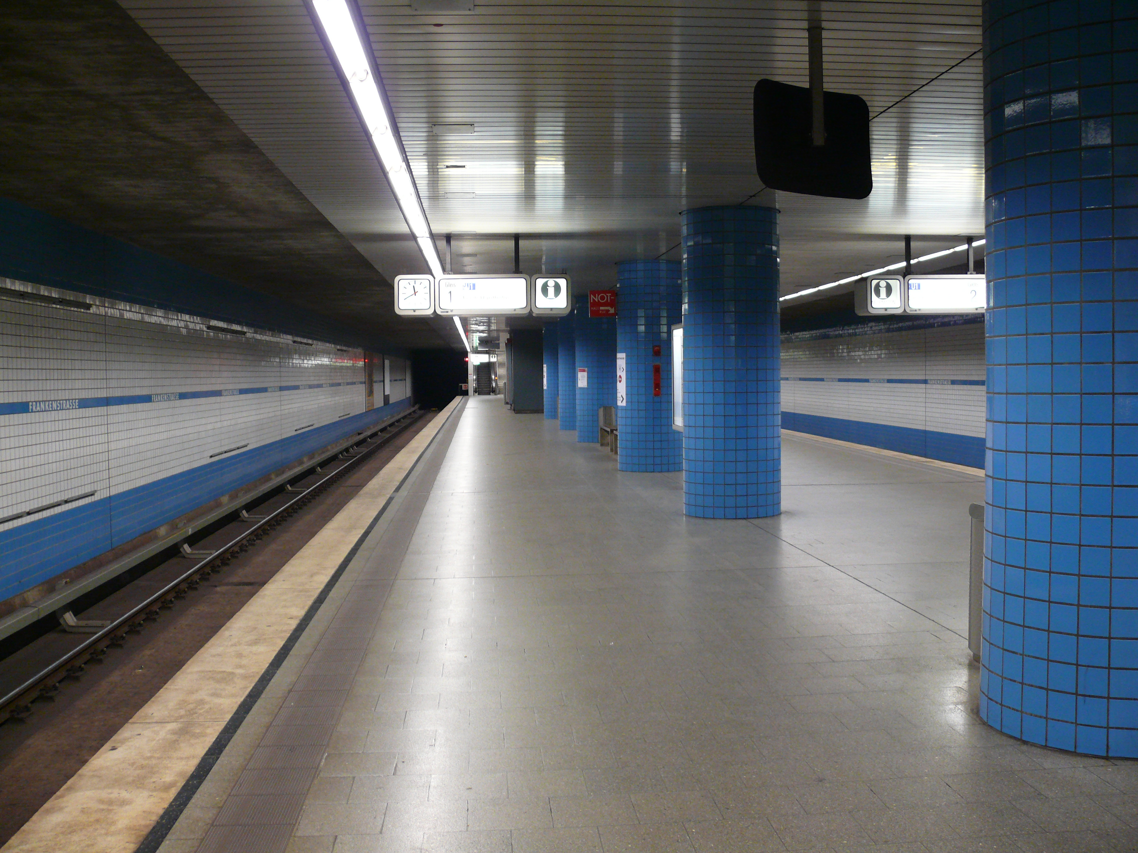 Bahnsteigebene am U-Bahnhof Frankenstraße in Nürnberg.